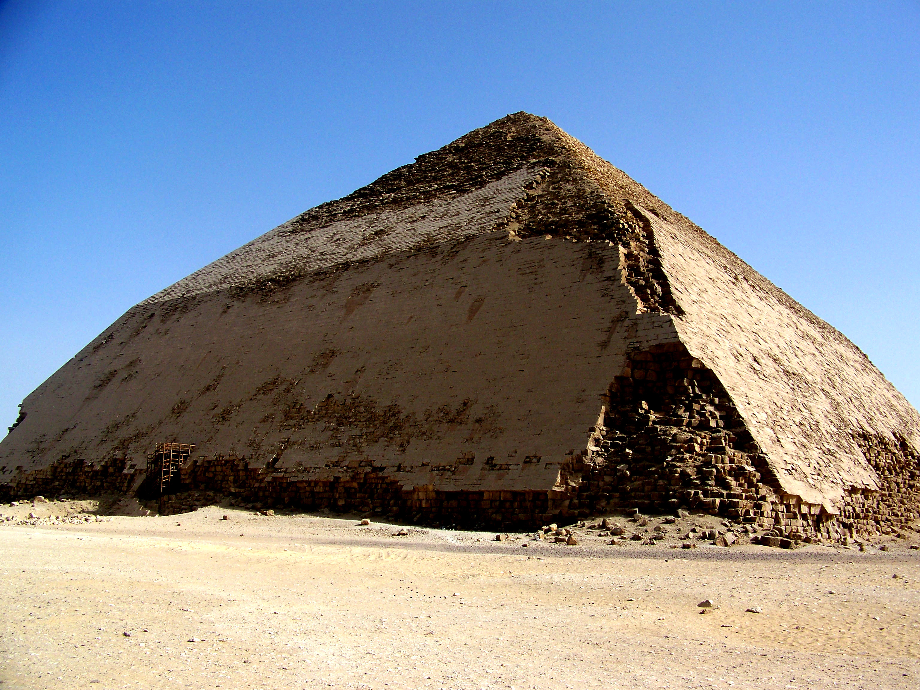 Bent Pyramid at Dahshur